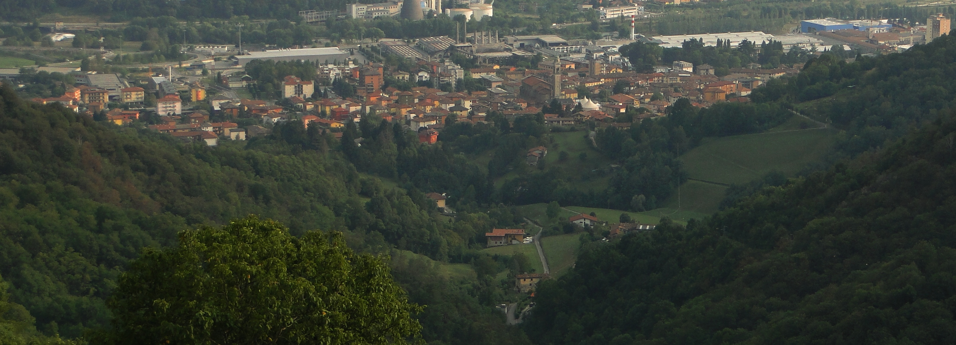 Panorama di Alzano Sopra, fraz. di Alzano Lombardo (BG).